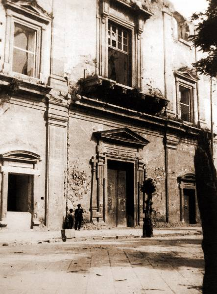 Foto del Terremoto di Messina del 1908, con le rovine dell'Ospedale Maggiore di Messina, opera di Andrea Calamech.